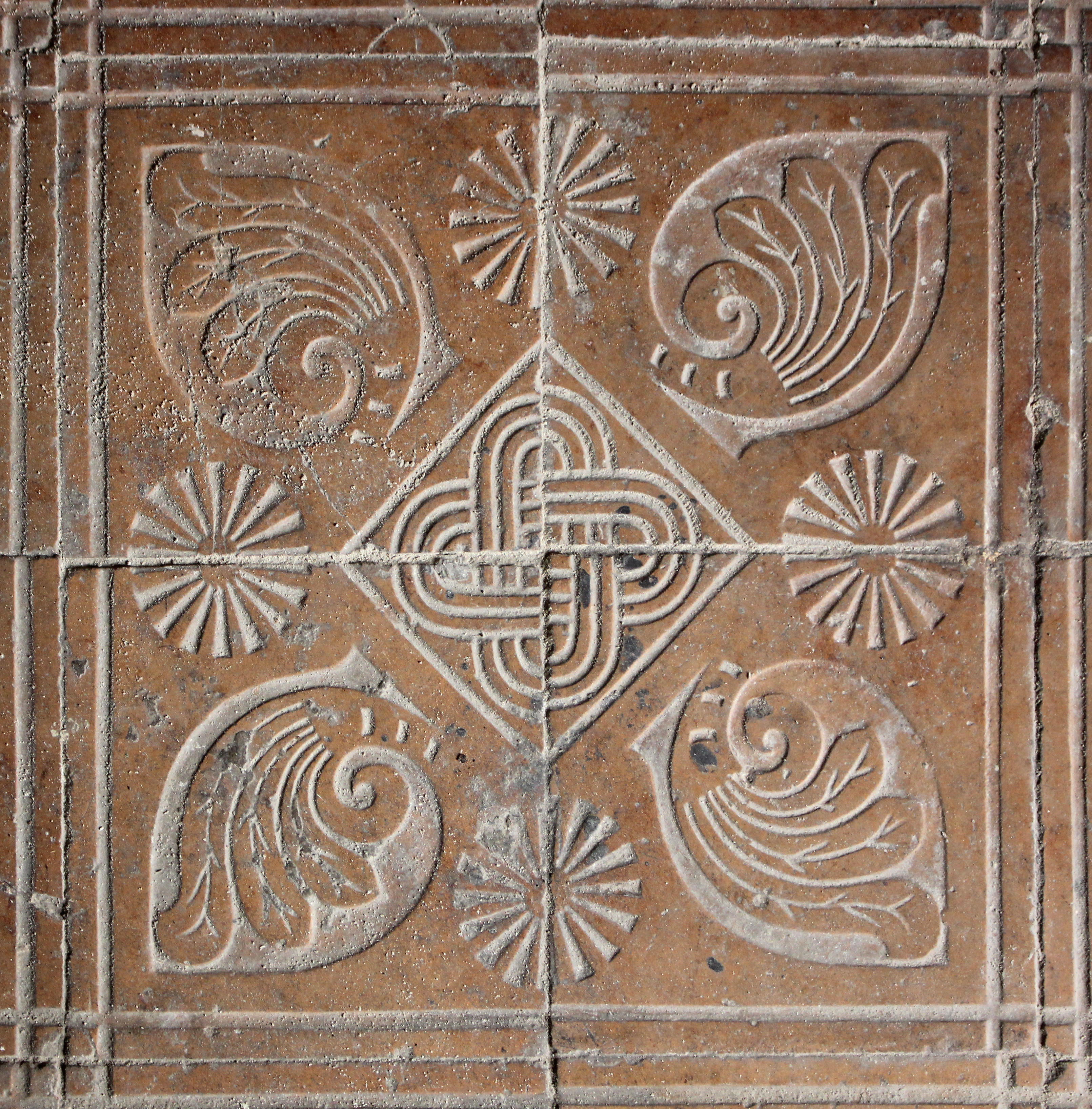 Bodenfliese aus dem 19. Jahrhundert im Chor der Alten Kapelle in Mülheim-Kärlich